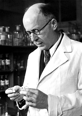 Lavoslav Ružićka, Nobel Prize in Chemistry 1939